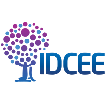 Логотип належить команді організаторів конференції "IDCEE.Інтернет-технології та іновації".